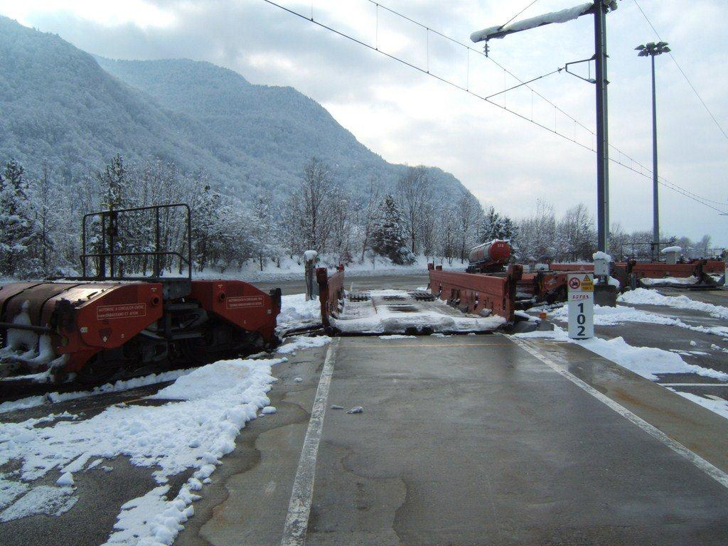 Système, train et wagon Modalohr, plateforme d'Aiton, Savoie, France